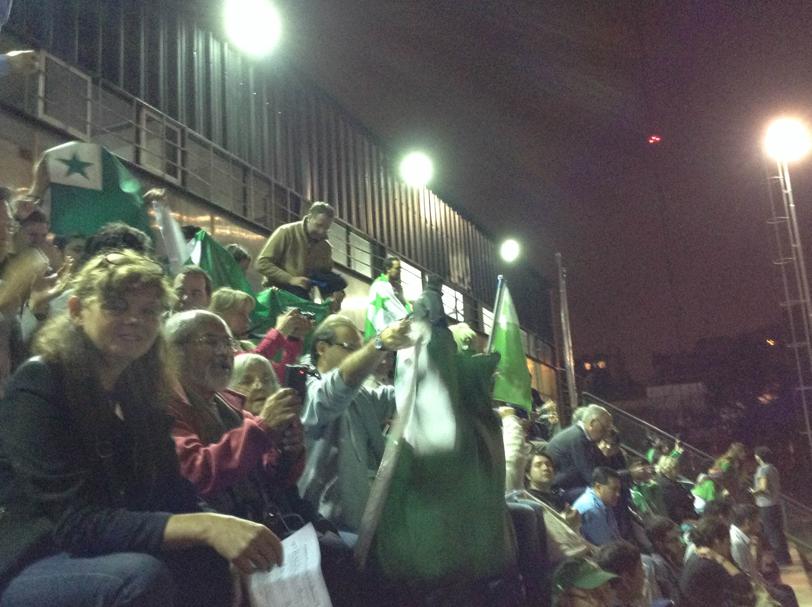 Partido del 31 de julio de 2014 que enfrento a esta selección contra la de la comunidad de descendientes armenios de argentina en Buenos Aires, en el cuadro del 99avo Congreso Universal de EsperantoEsperanto: Matĉo de la 31a de julio 2014 inter la esperanta teamo kaj la armen-devena argentina komunumo en Bonaero, kadre de la 99a UK.